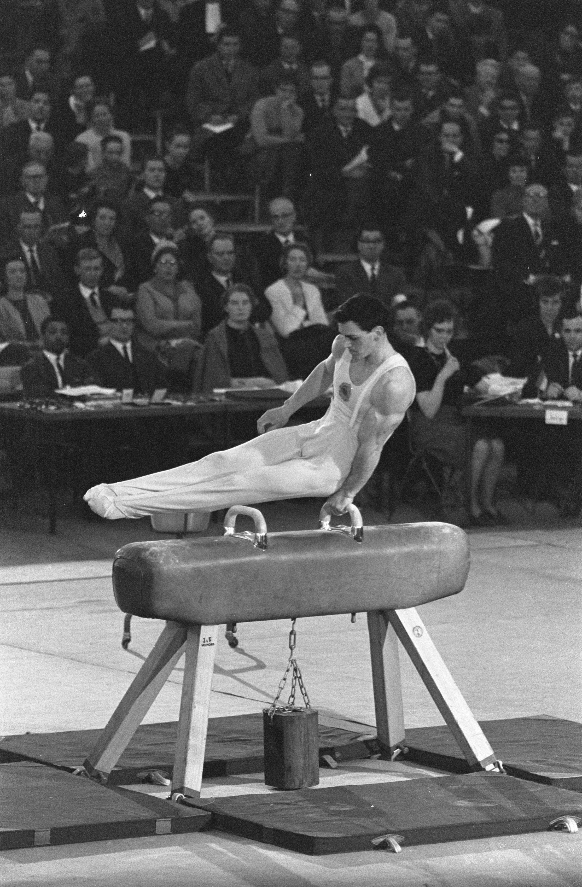 Collectie / Archief : Fotocollectie Anefo Reportage / Serie : [ onbekend ] Beschrijving : Vierlandenturnwedstrijden in de RAI, Miroslav Cerar (Joegoslavie) tijdens zijn paardoefening Datum : 24 februari 1963 Trefwoorden : turnwedstrijden Instellingsnaam : RAI Fotograaf : Pot, Harry / Anefo Auteursrechthebbende : Nationaal Archief Materiaalsoort : Negatief (zwart/wit) Nummer archiefinventaris : bekijk toegang 2.24.01.05 Bestanddeelnummer : 914-8637